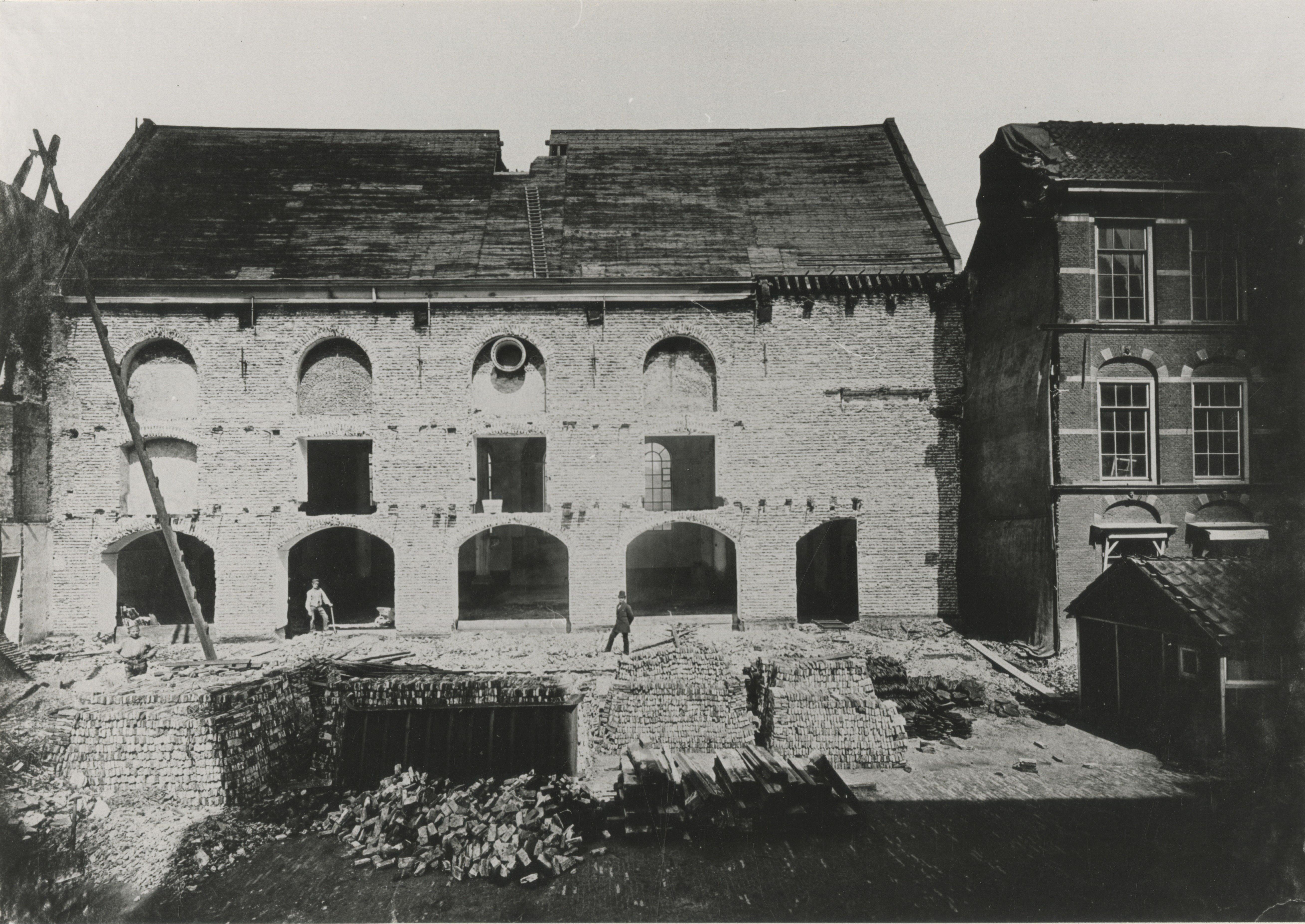 Binnenhofcomplex Hofkapel: aanzicht